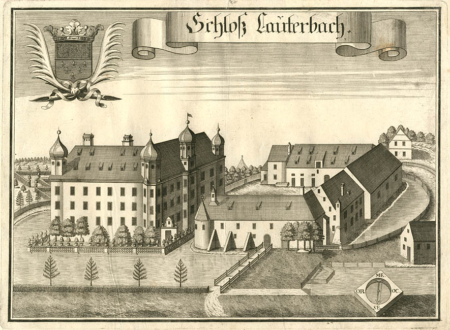 “Schloß Lauterbach.” (Schloß Oberlauterbach), aus : “Historico topographica descriptio Bavariae”, Rentamt Landshut, Gericht Rottenburg,. 1723